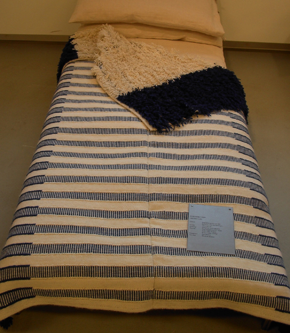 Ryatäcke från Hardemo i Örebro län, rekonstruerad vävning av Elisabet Jansson, Lindesberg.